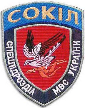 Логотип спецпідрозділу «Сокіл»